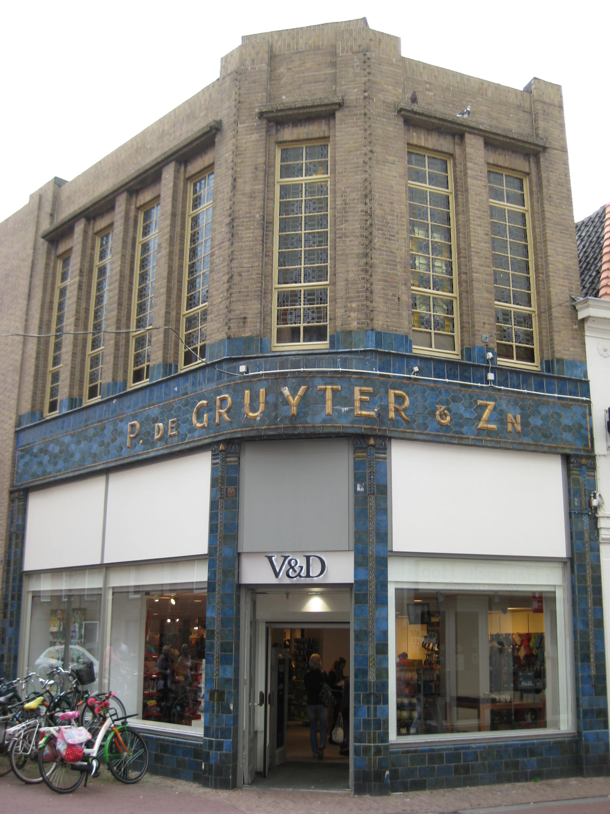 Het pand in de Nieuwsteeg in Hoorn waar vroeger een winkel van De Gruyter en nu een filiaal van V & D gevestigd is